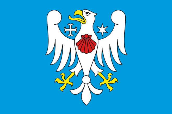 Vlajka obce Popovice, okres Benešov